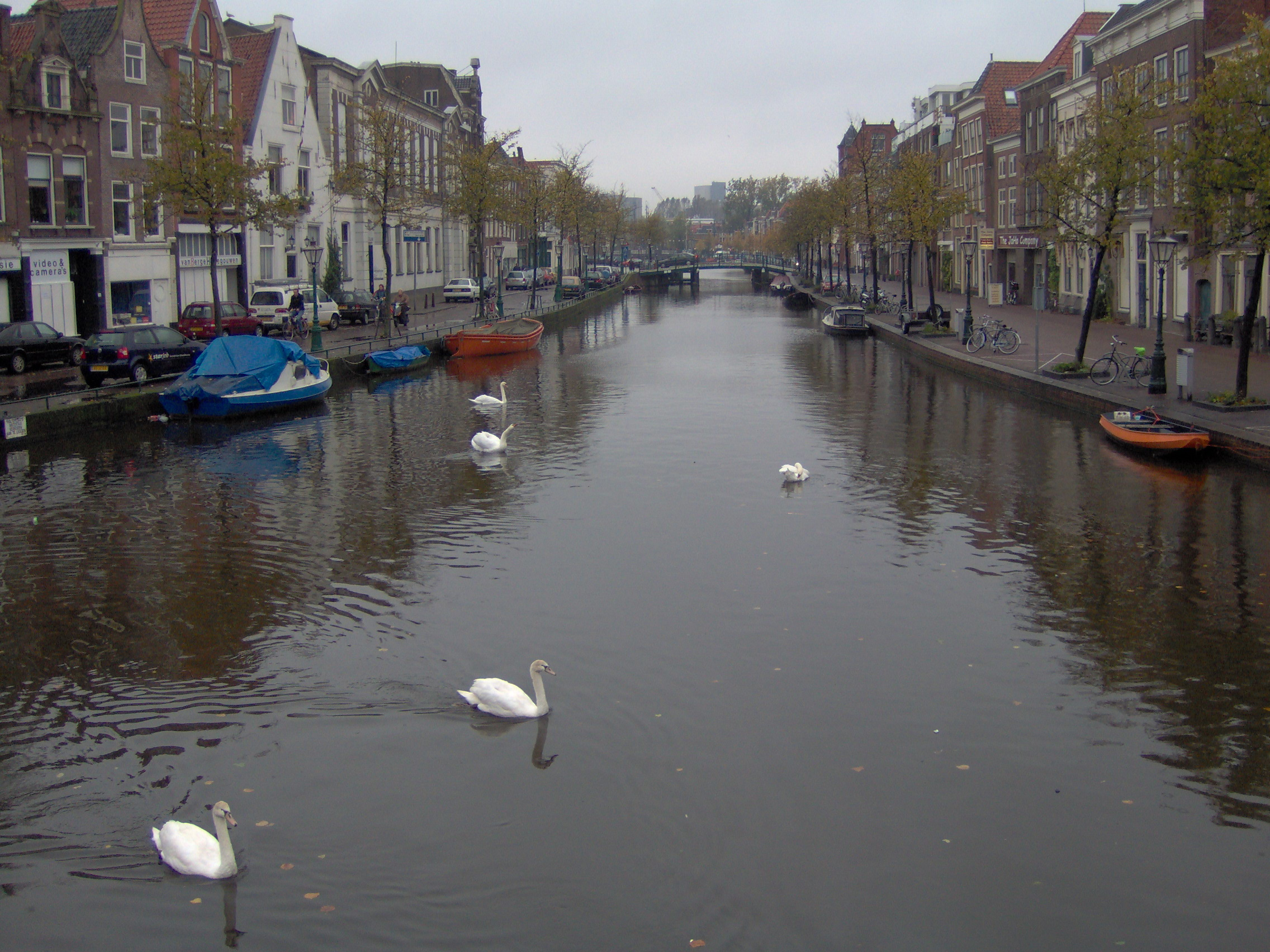 Basílica De La Virgen De Los Desamparados, València, Spain.